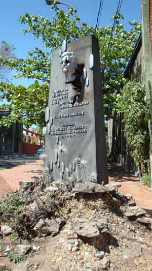 Monumento al periodista paraguayo santiago leguizamon, muerto el 26/04